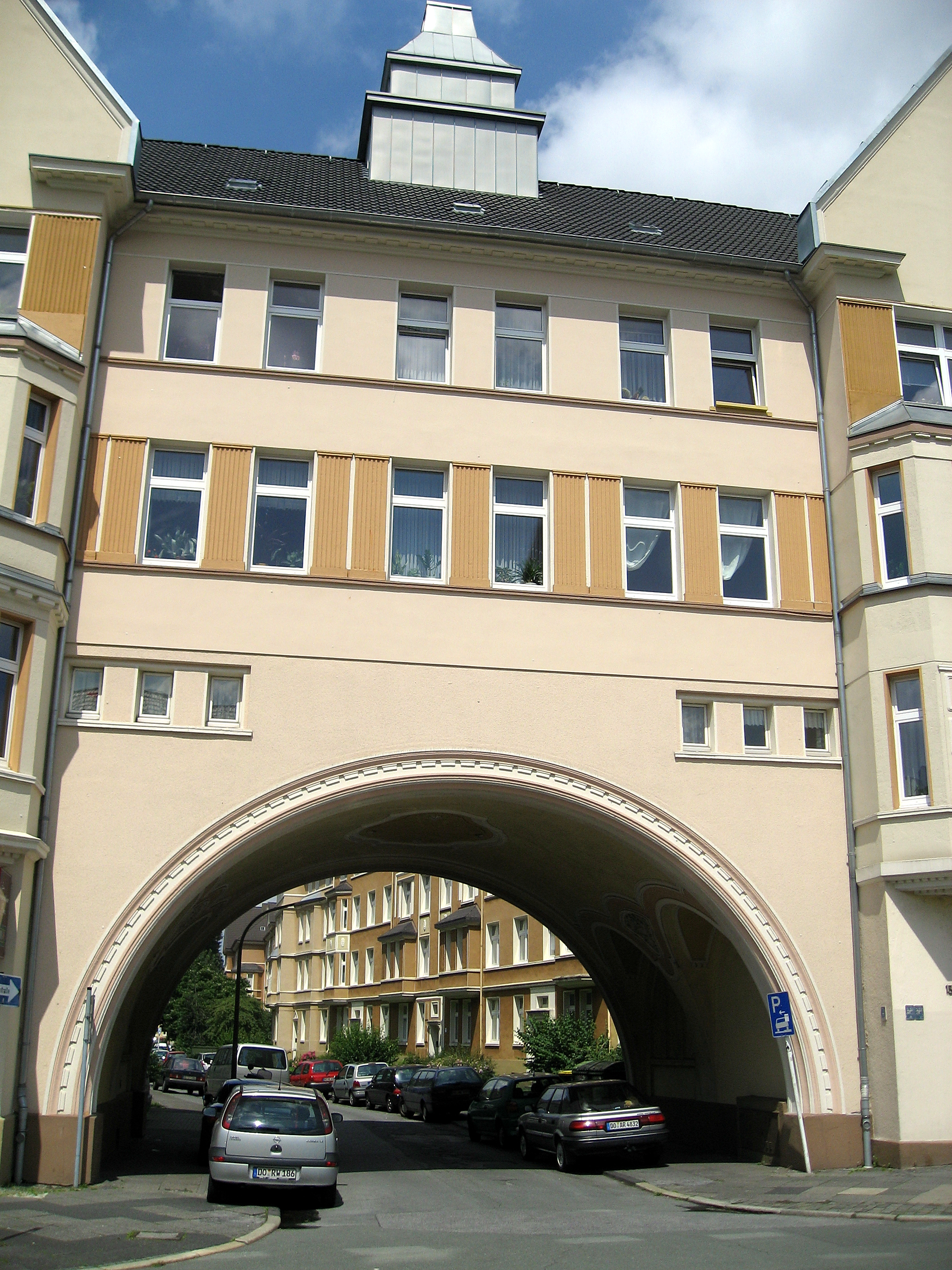 Dortmund, Althoffblock, Spar- und Bauverein, Zufahrt Althoffstraße von Neuer Graben, Blickrichtung Norden